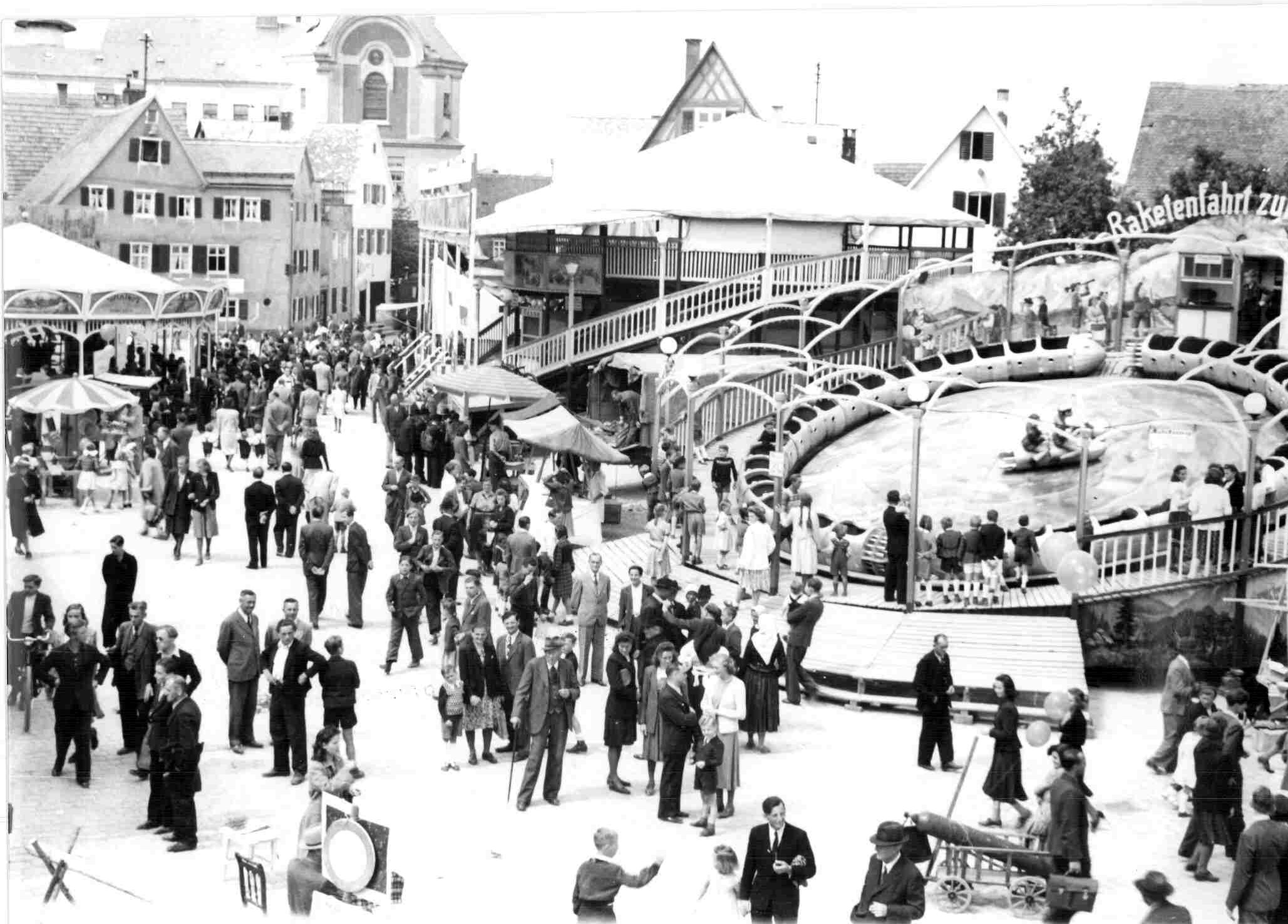 Die Messe in der Nördlinger Altstadt am Brettermarkt, im Hintergrund das ehemalige Kloster Maria Stern, das 1986 durch den heutigen Neubau ersetzt wurde.